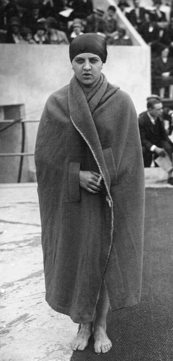 Tourelles, championnats de France de natation : Melle Horrent (portrait) : [photographie de presse] / Agence Meurisse